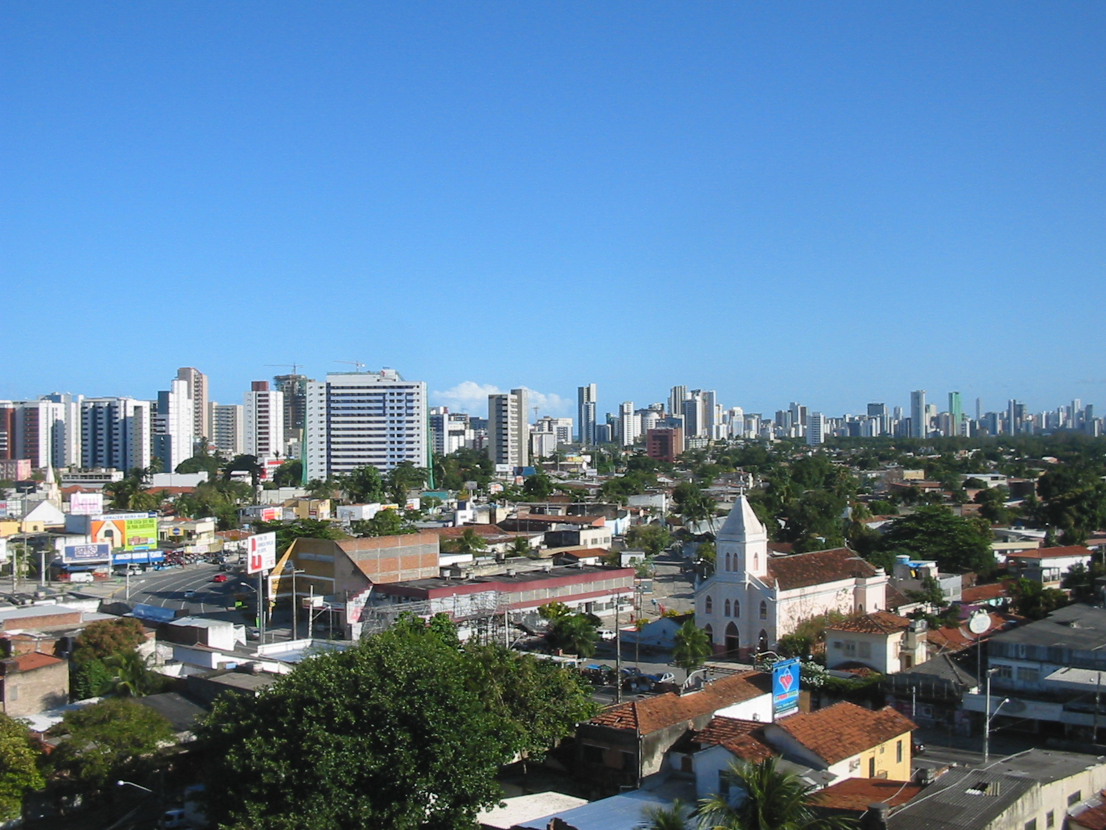 Recife (Pernambuco), Brasil. Bairro de Boa Viagem ao fundo visto a partir do bairro do Pina. Boa Viagem district in the back viewed from Pina district. Recife (Pernambuco), Brazil.